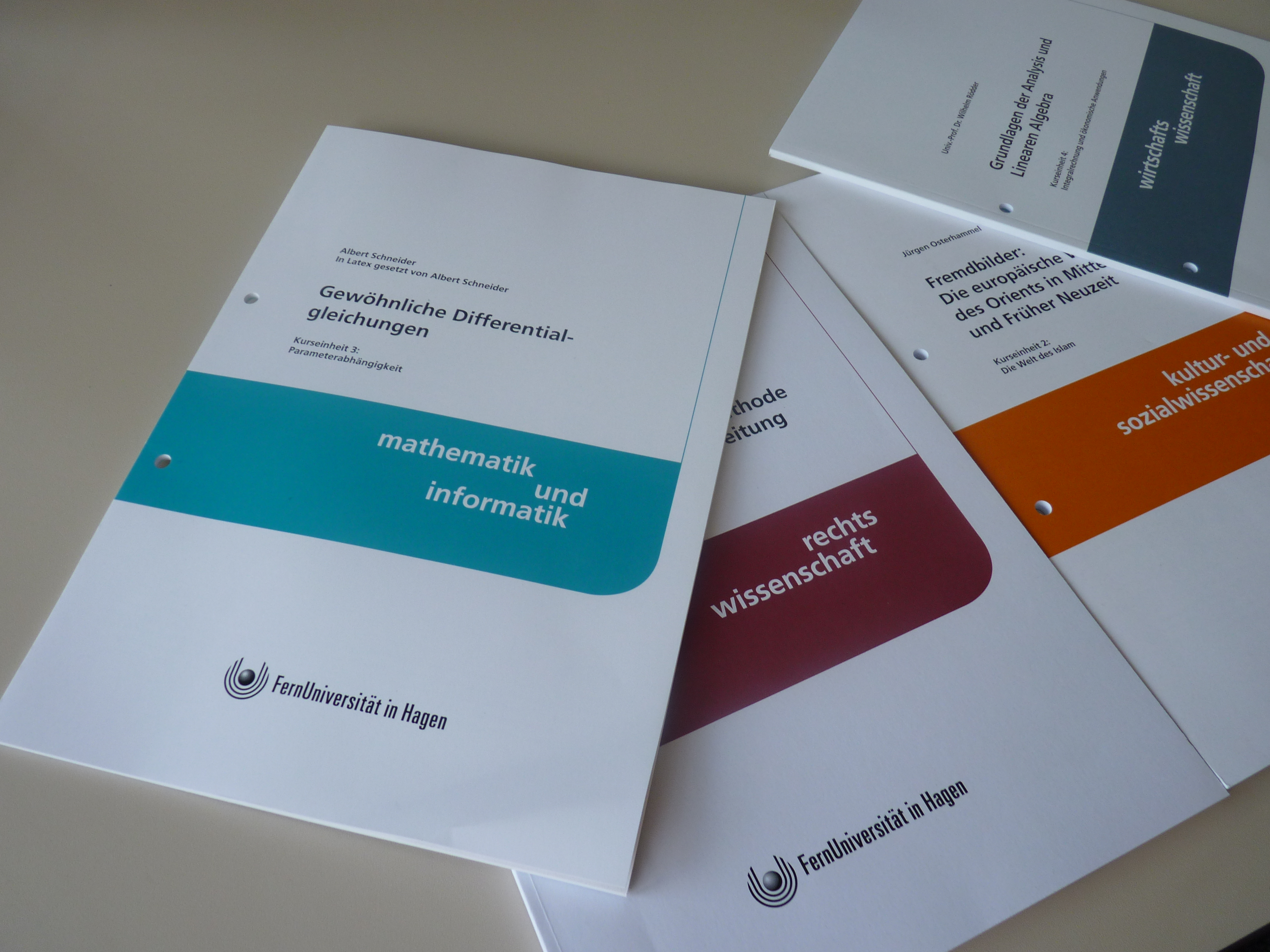 Studienbriefe als Ersatz für die Vermittlung von Lehrinhalten mit unterschiedlichen Farbkennzeichnungen für die insgesamt vier Fakultäten